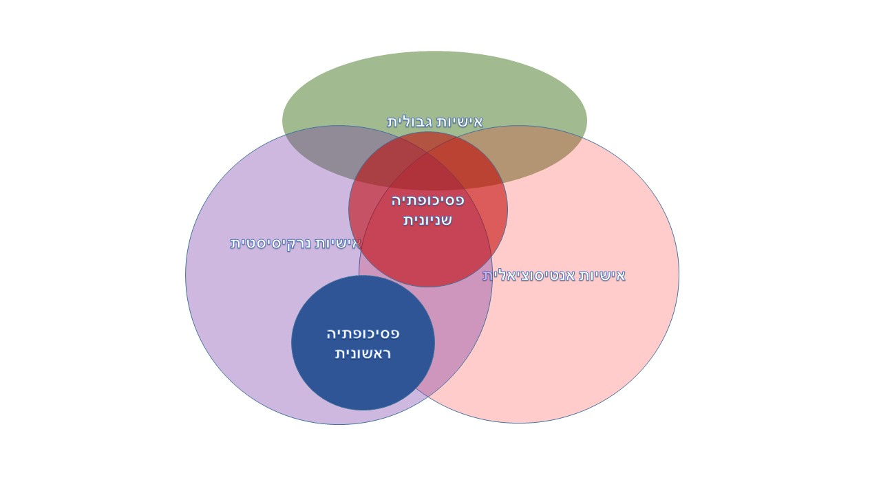 פסיכופתיה שניונית על הרצף הגבולי ואילו פסיכופתיה ראשונית נמצאת על הרצף הנרקיסיסטי.